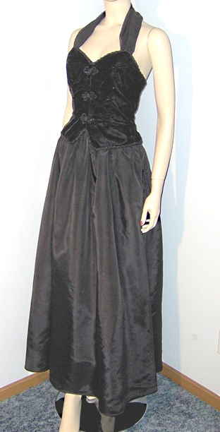 Long evening dress